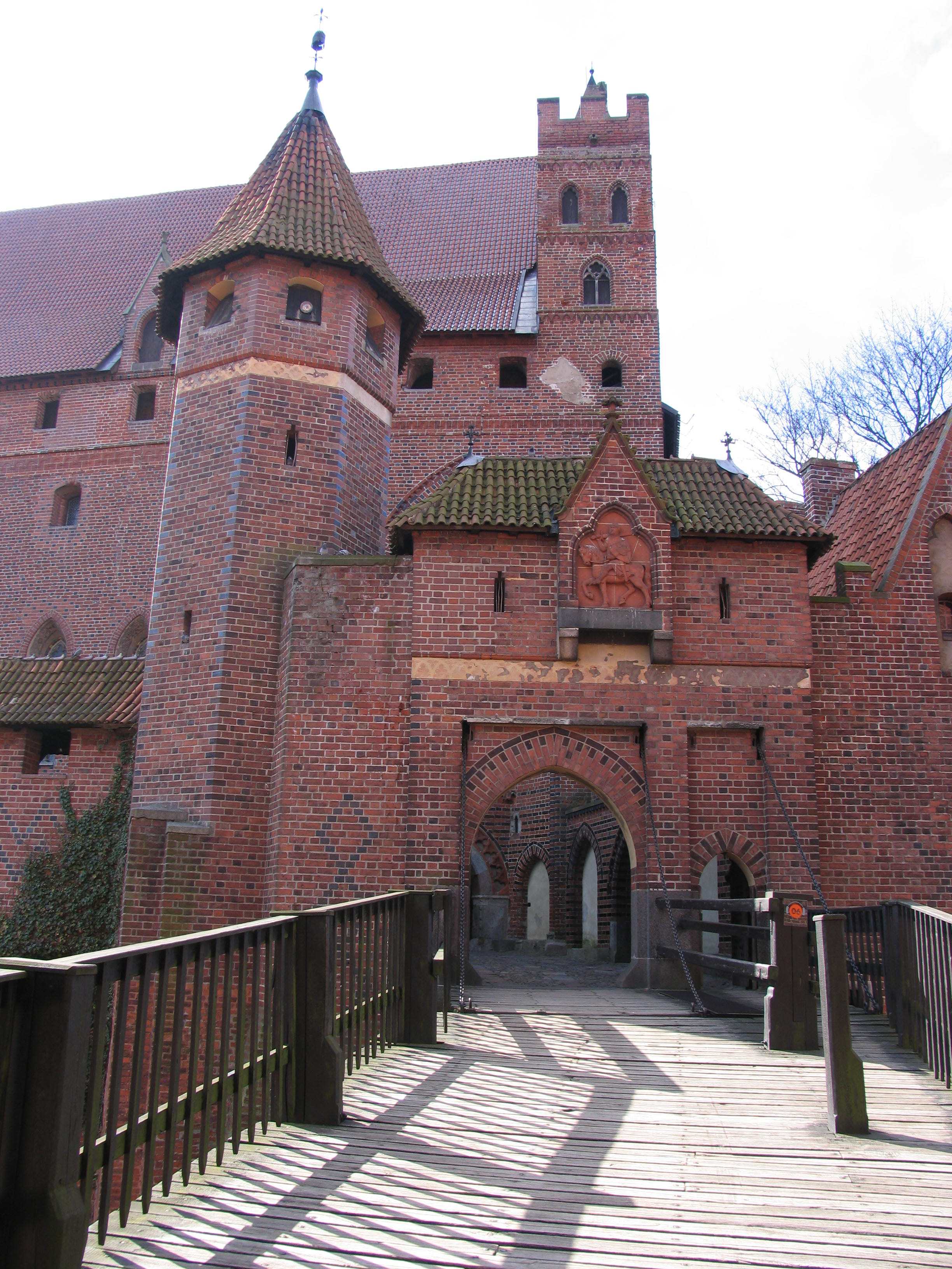 Malbork, zespół zamku krzyżackiego, XIII, XIX